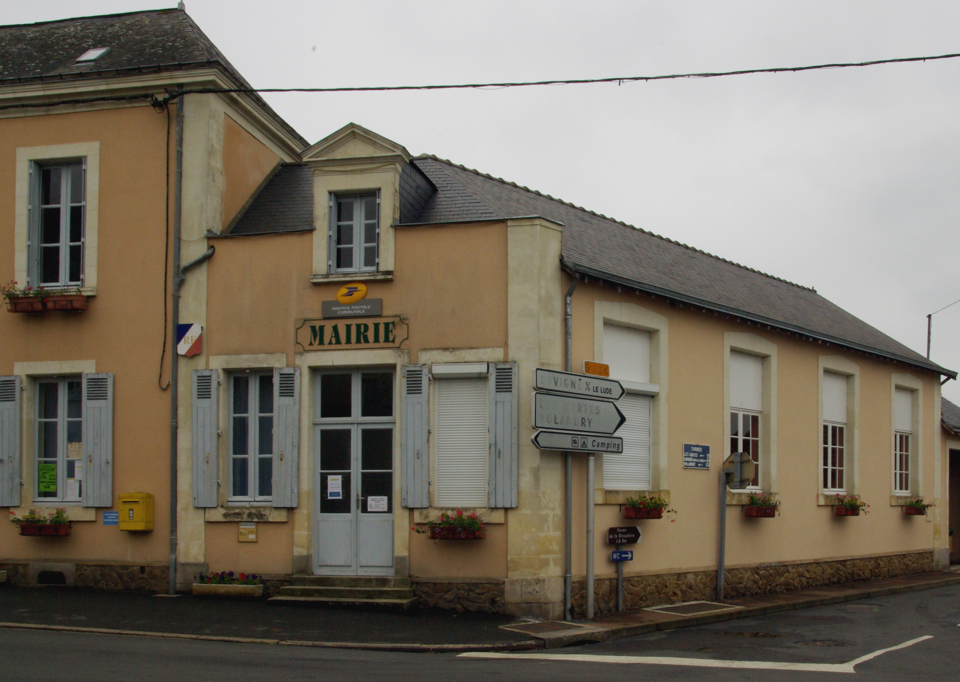 Gemeentehuis van Thorée-les-Pins